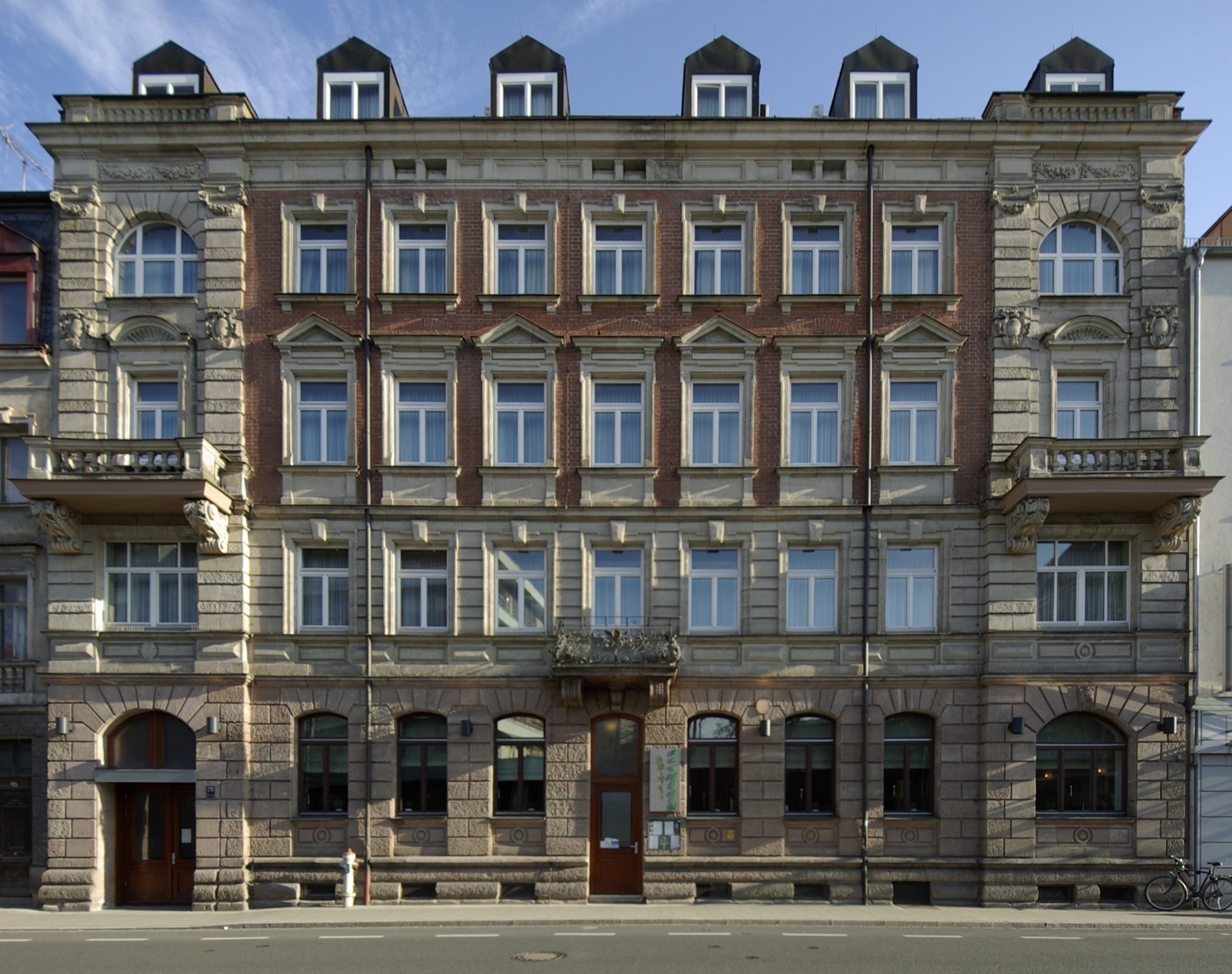 Ehemaliges Colosseum (auch Kolosseum), Henkestraße 28, in Erlangen